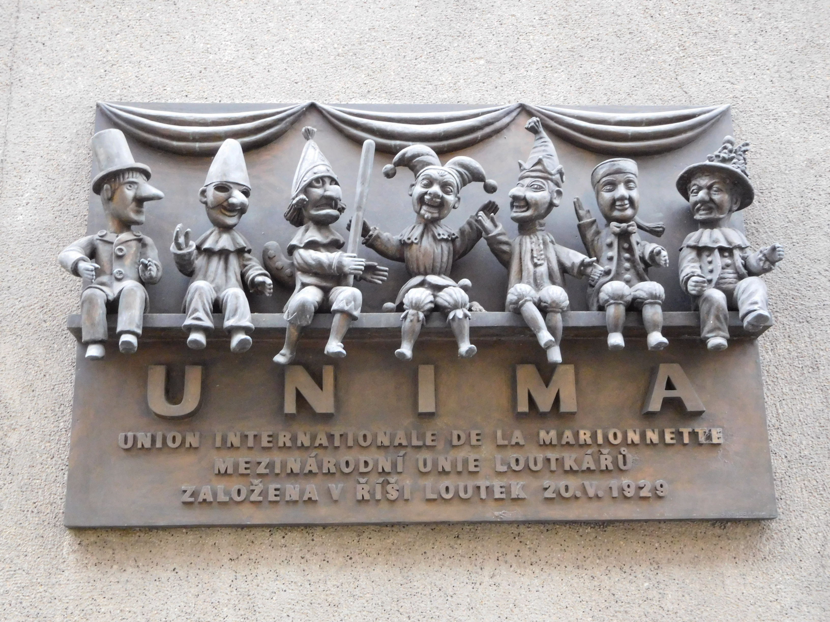 Praha - Staré Město, Žatecká 1 - Pamětní deska Mezinárodní unie loutkářů